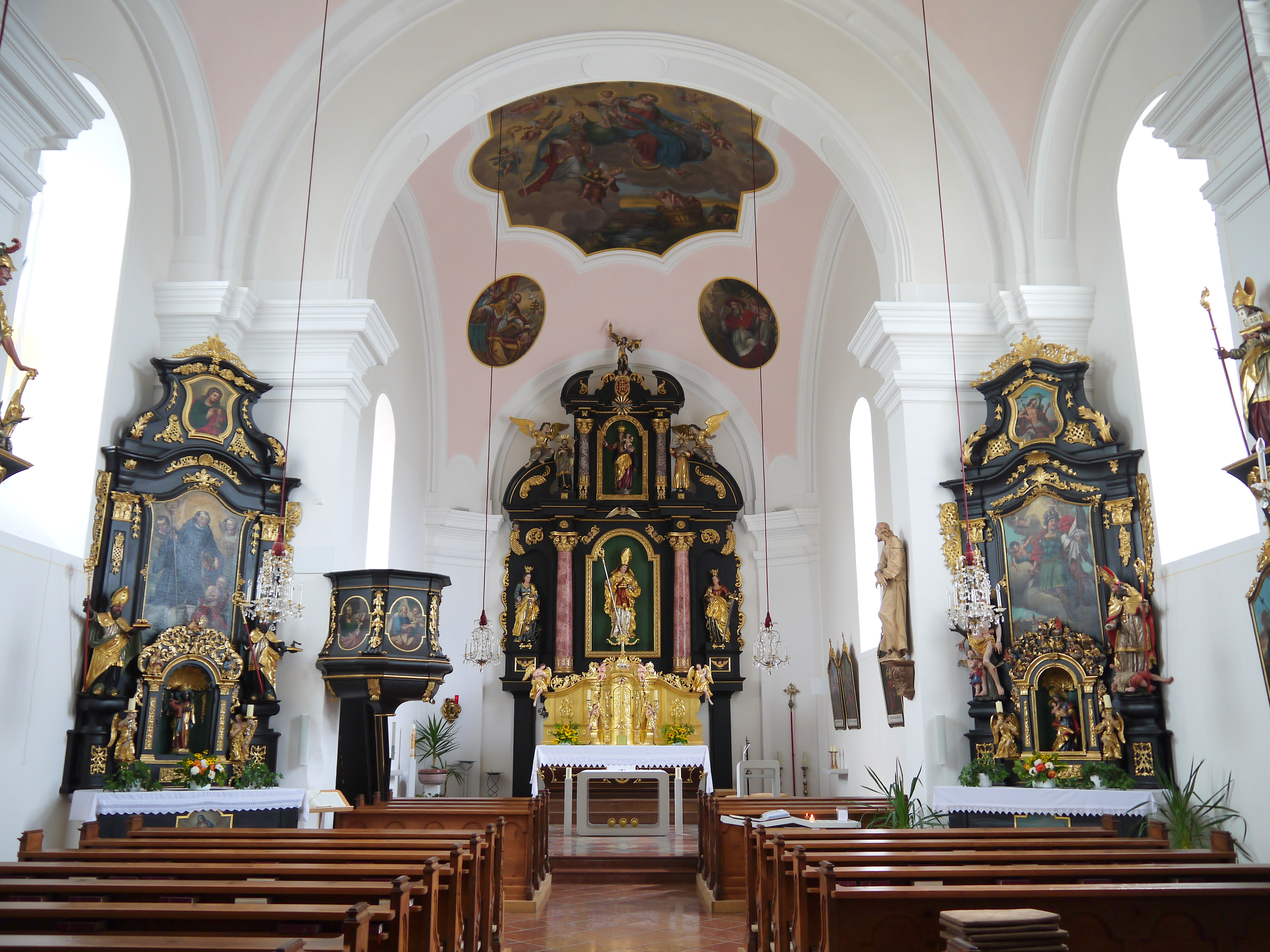 Kath. Pfarrkirche hl. Nikolaus und Friedhof